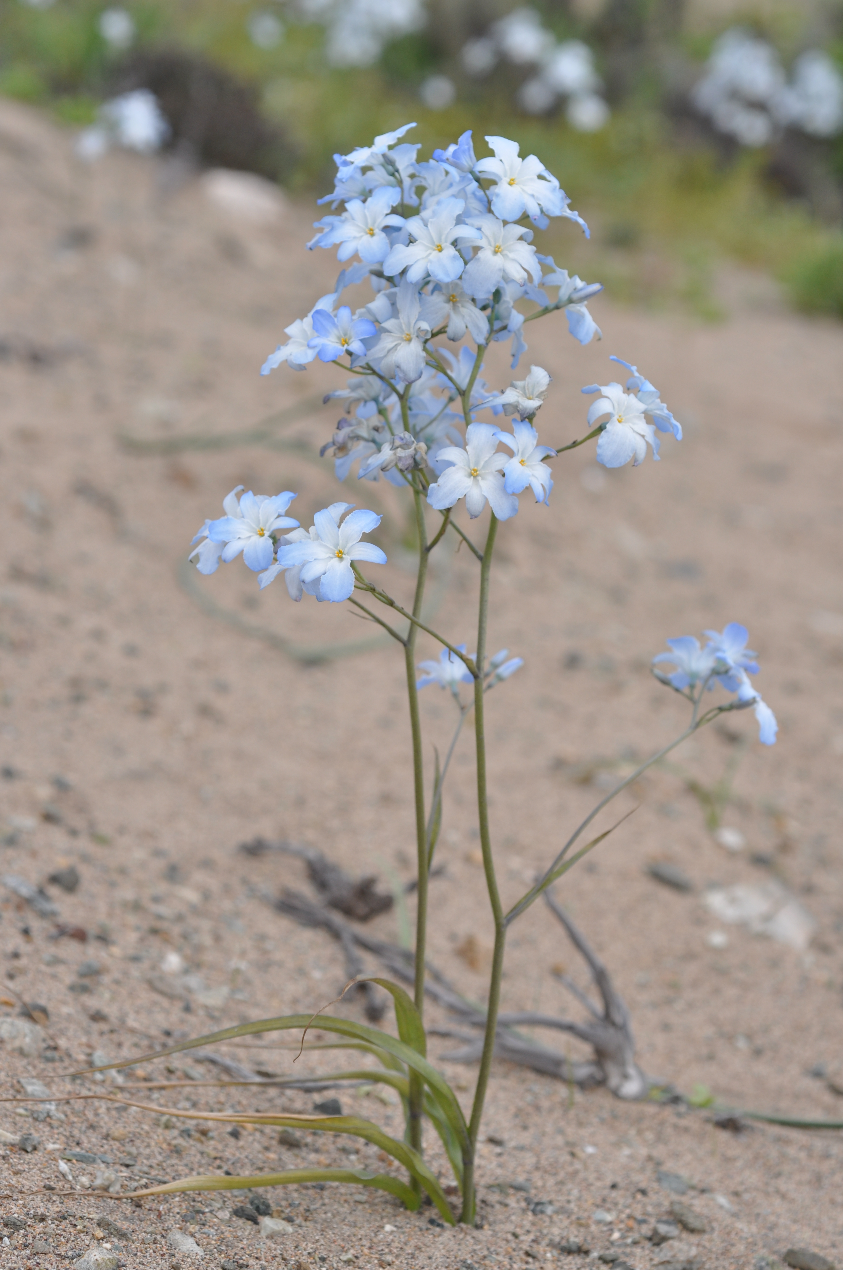 Zephyra elegans Desierto Florido 2011 Costa de Huasco, Región de Atacama